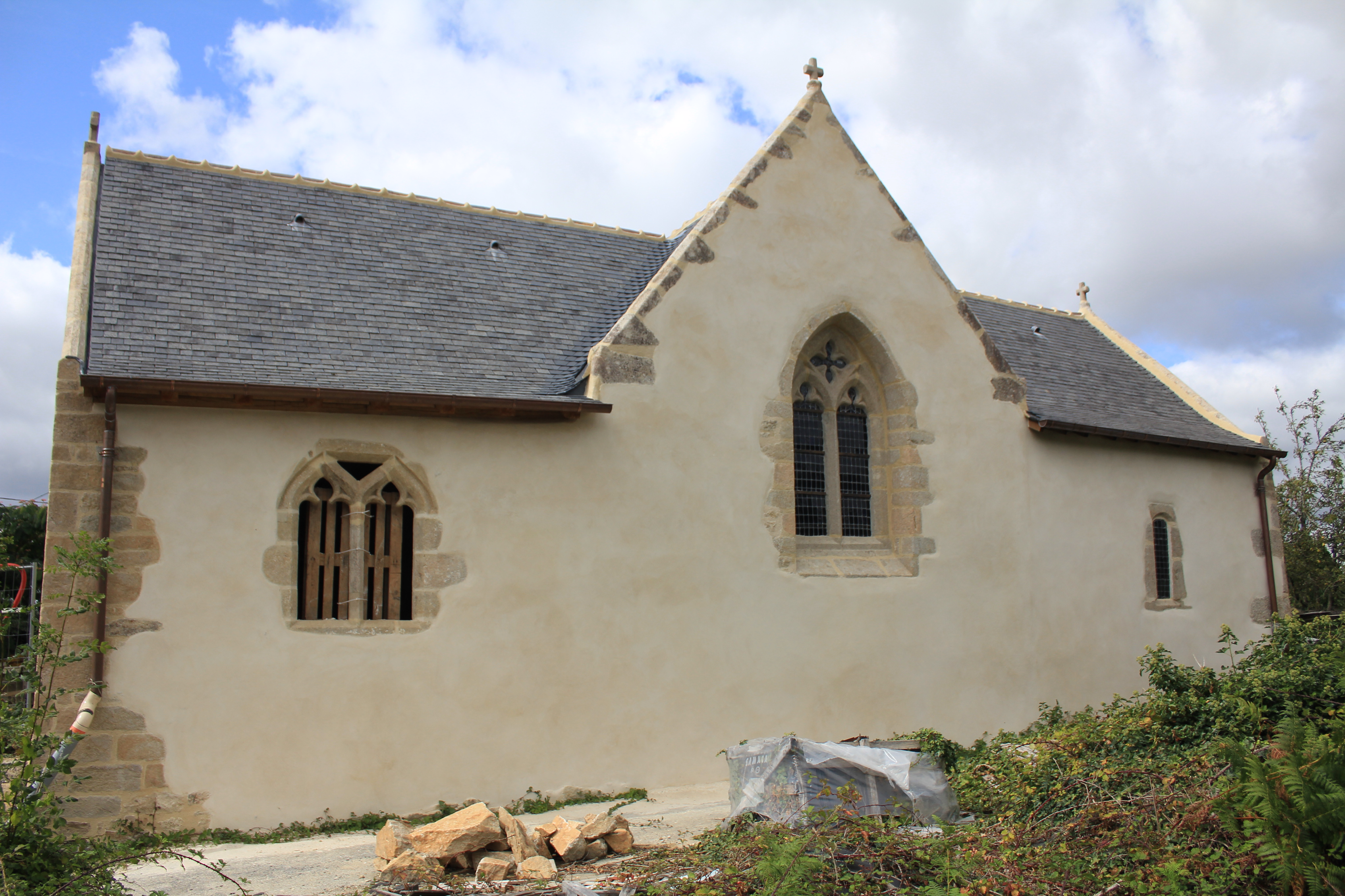 Chapelle de Locmaria de Nostang .